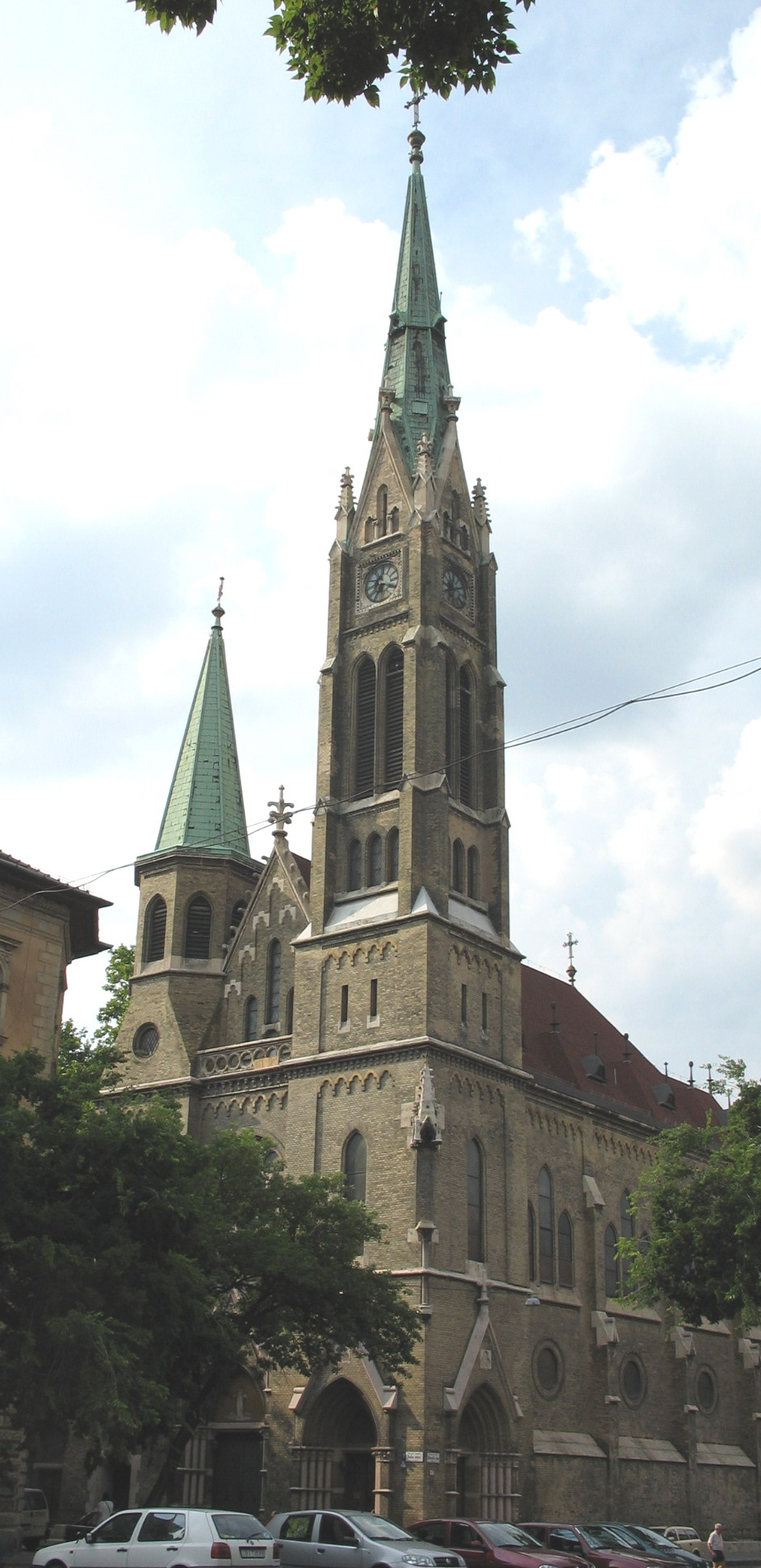 Budapest XIII, Huba utcai kármelita templom